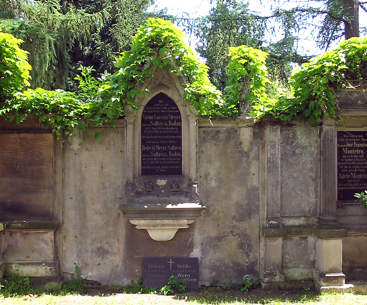 Radebeul, Friedhof Radebeul-West, Familiengrabmal Meyer genannt von Sallawa und Radau